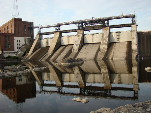 Barrage de la chute Hemming Au Centre du Québec a Drummondville Centrale hydroélectrique Hemming 1235, Chemin Hemming, Drummondville, Quebec, J2B, Canada photographié par: Clément Lambert . Centrale hydroélectrique de Drummondville Situé au centre du Québec au Québec Canada